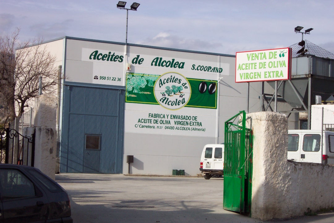 Una de las dos almazaras de Alcolea Almazara de Alcolea de Almería Fotografía realizada por José Manuel Escudero, febrero de 2003.